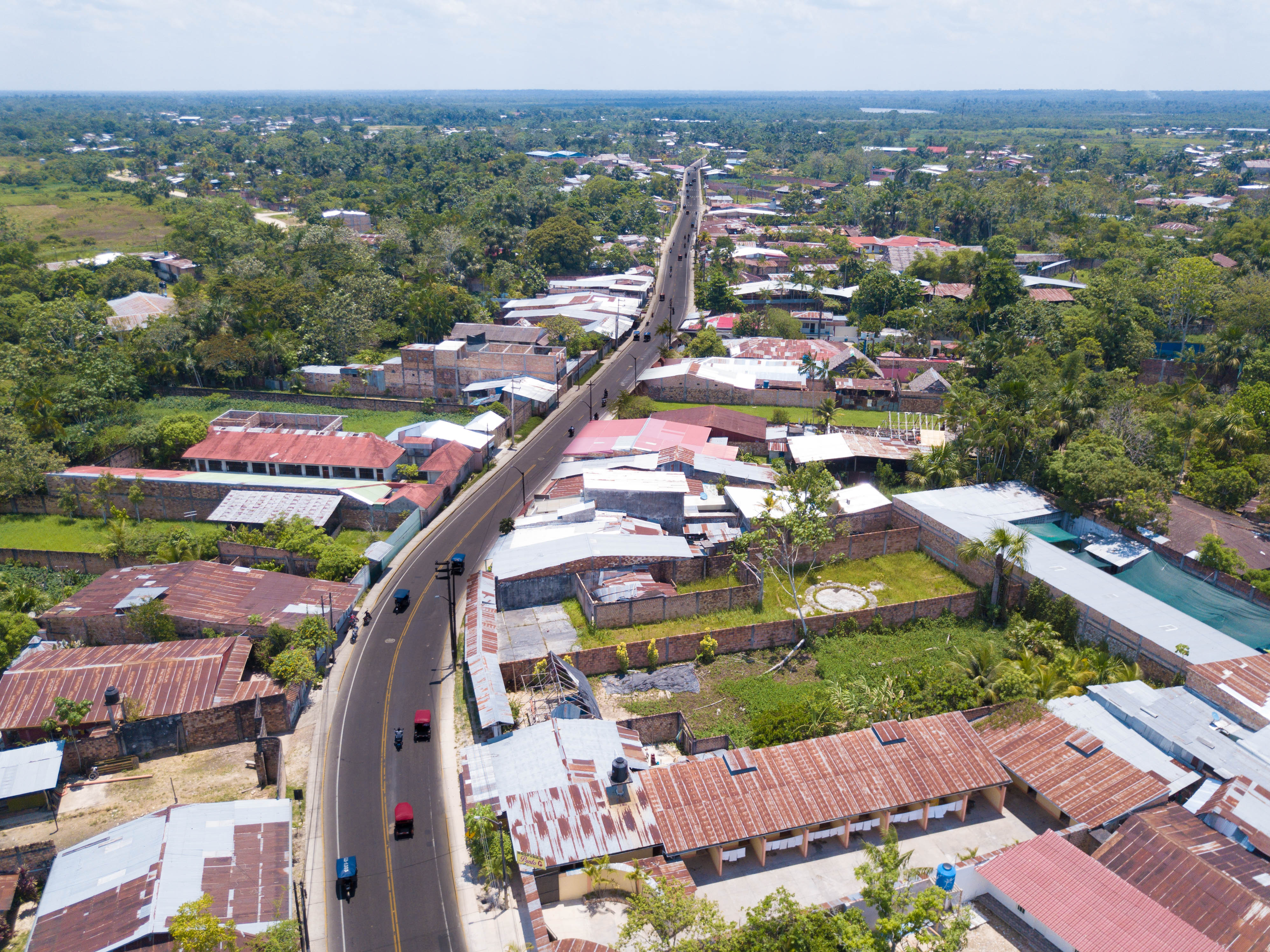 vista aérea de la carretera santa clara